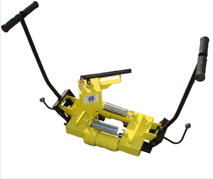 Разгонщик зазоров гидравлический РЗ-25